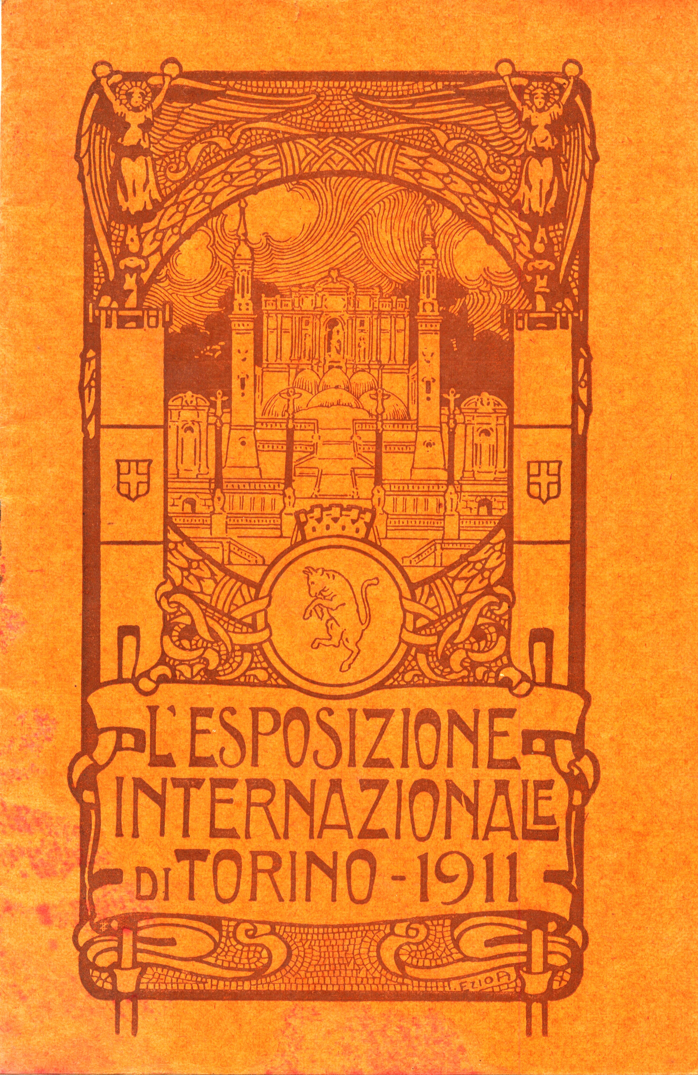 Logo dell'esposizione internazionale di Torino del 1911